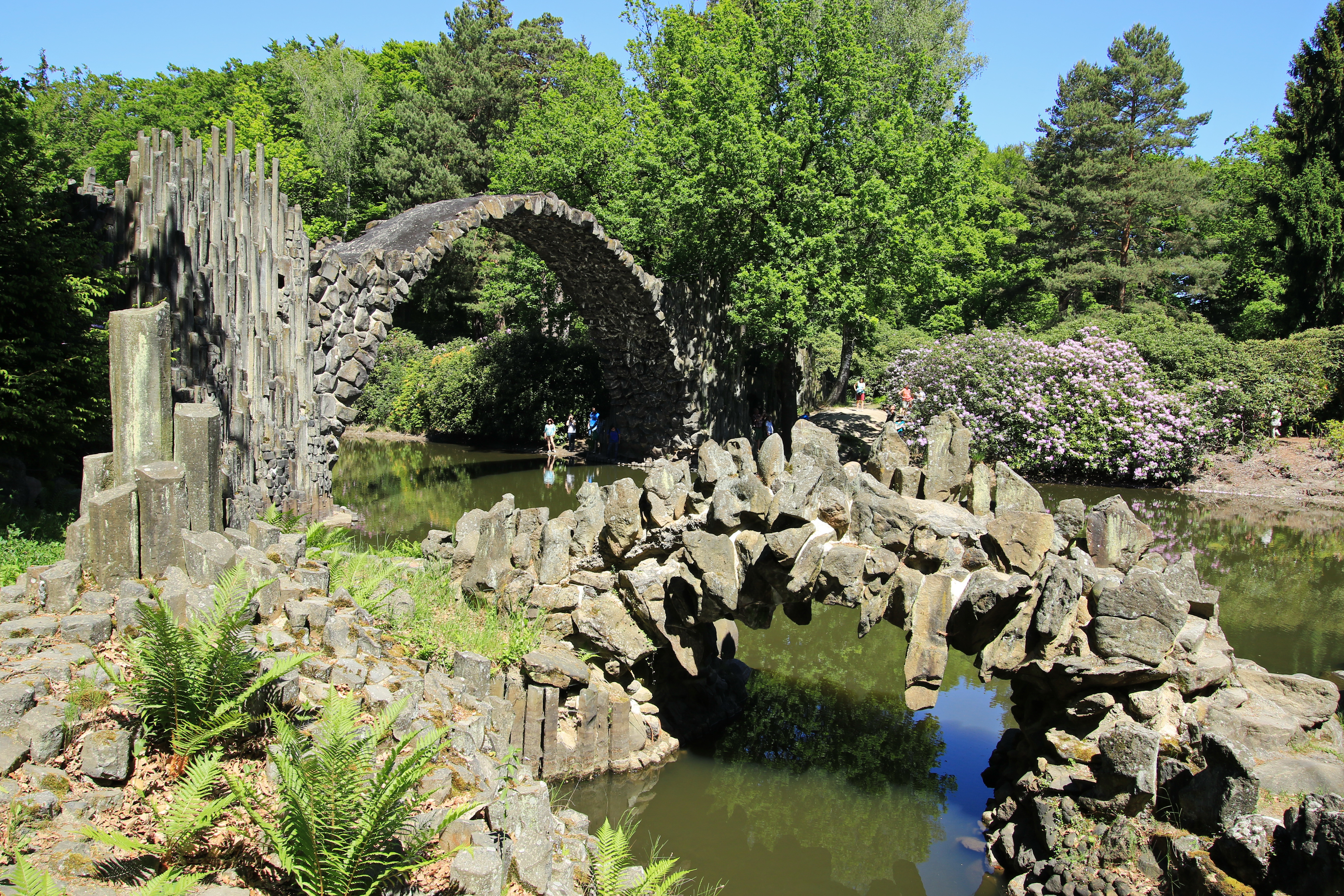 Rakotzbrücke im Azaleen- und Rhododendronpark Kromlau. Diese Datei zeigt das sächsische Kulturdenkmal mit der ID 09303000